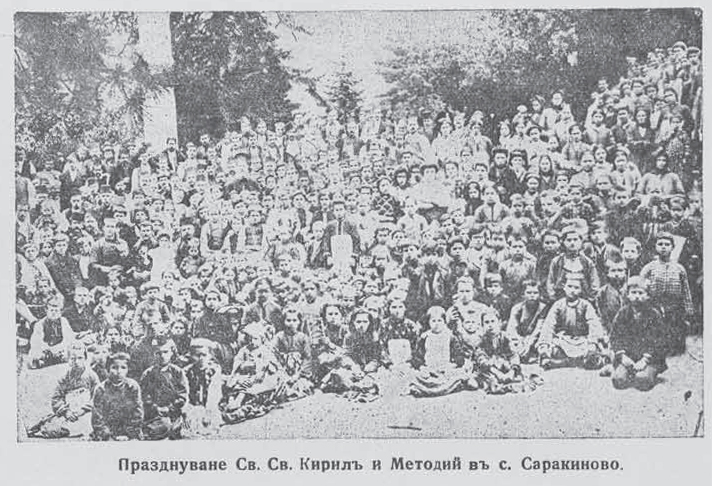 11 may in Sarakinovo